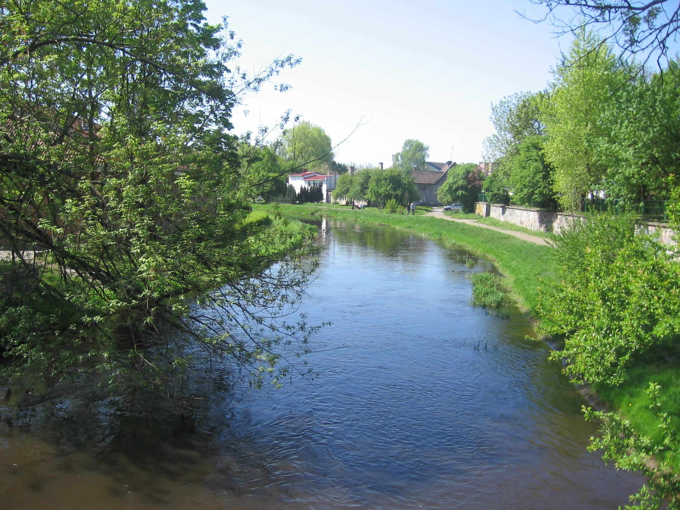 Zakole Regi